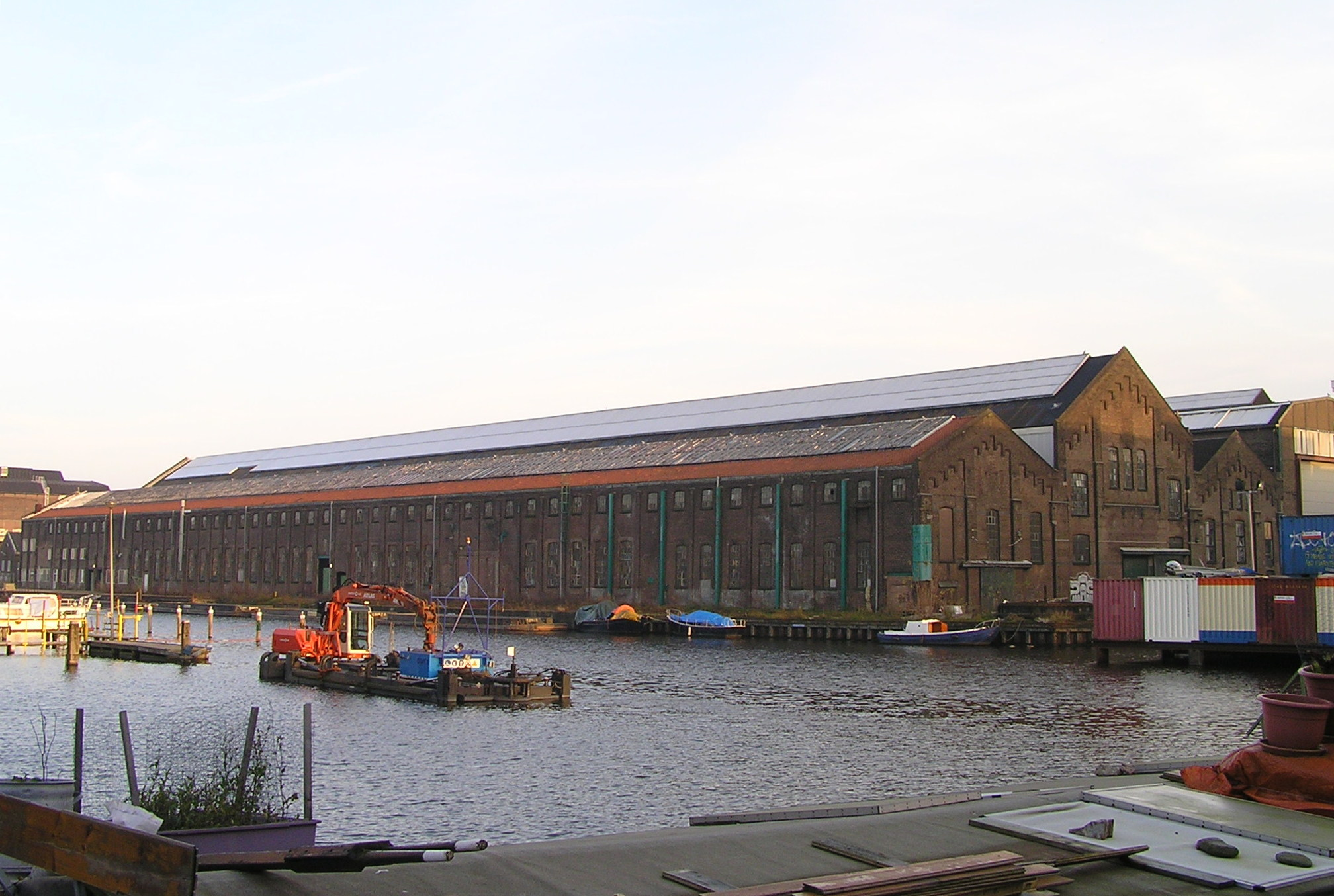 Van Gendthallen, gezien vanuit het zuidwesten. Datum foto: 21-11-2010